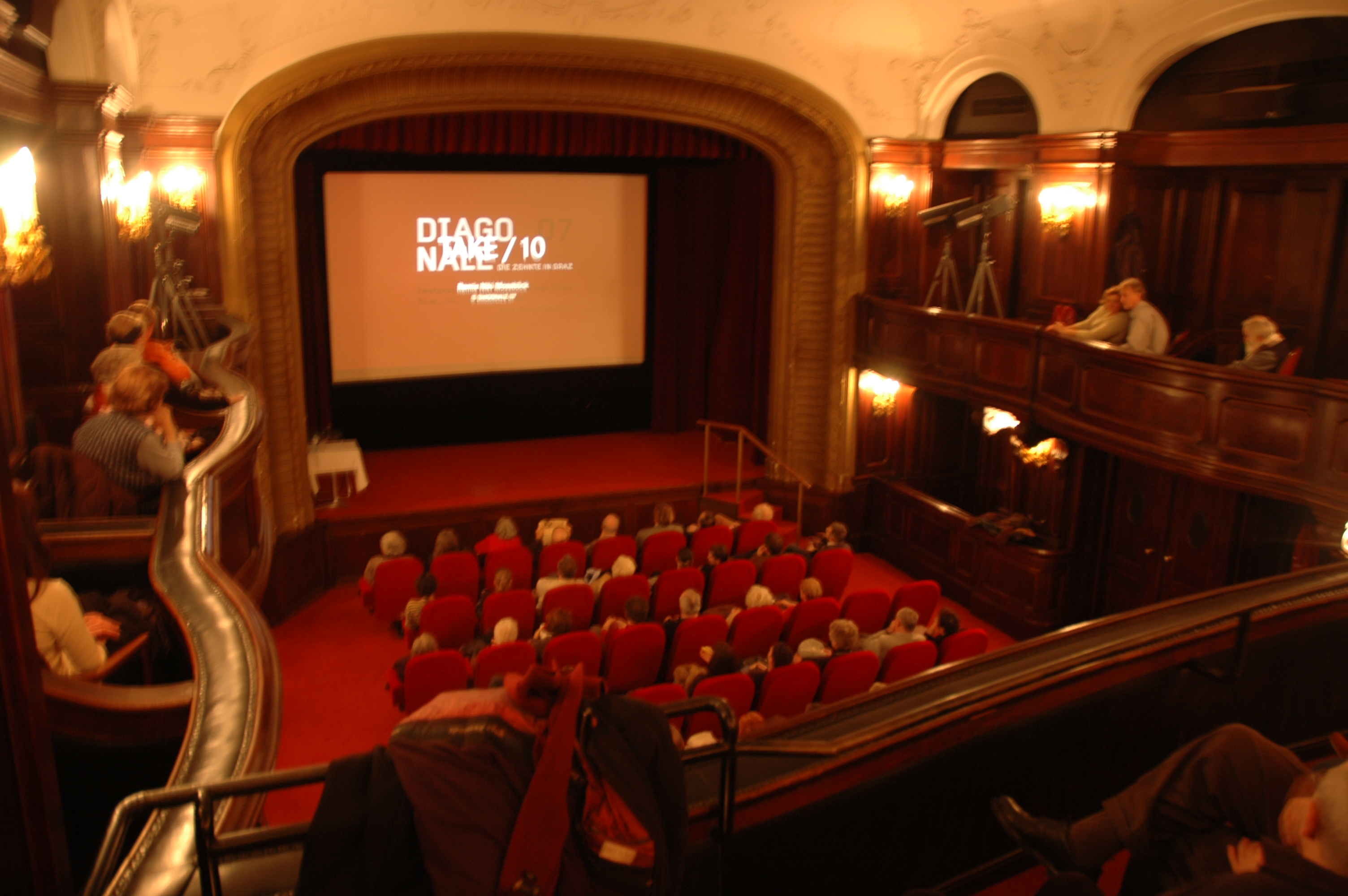 Innenansicht des Metro Kinos in Wien I, Johannesgasse 4 - war vormals ein Theater, seit 1951 Kino